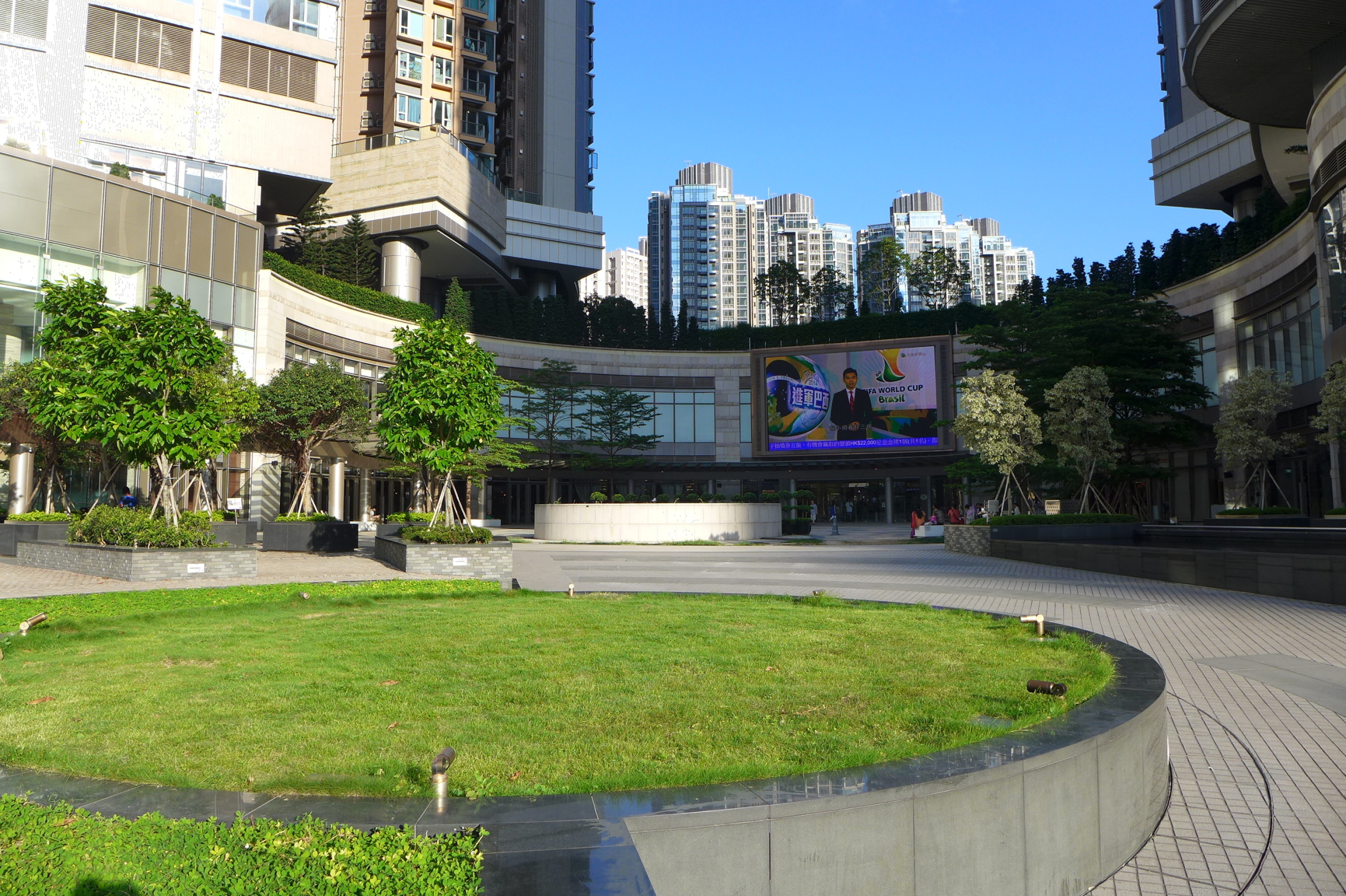 PopCorn Civil Plaza